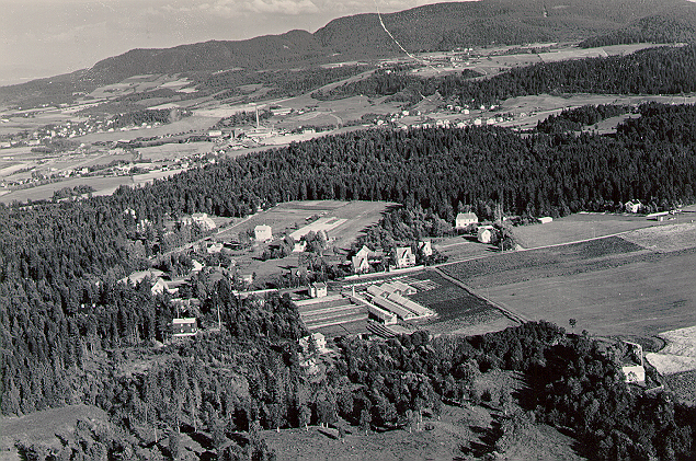 Oversiktsbilde over Øvre Charlottenlund ved Presthus, med Furumoen gartneri fremst i bildet. Ranheim med fabrikken i bakgrunnen. Reppe på flata bak til høyre. Bildet har påskriften Jakobsli, men dette området er lengre sør, rundt gården Jakobsli, fra idrettsplassen og et stykke sør mot Jonsvannsveien.